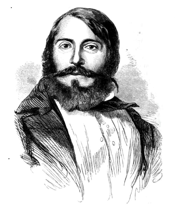 Jose Santos Guardiola, president of Honduras